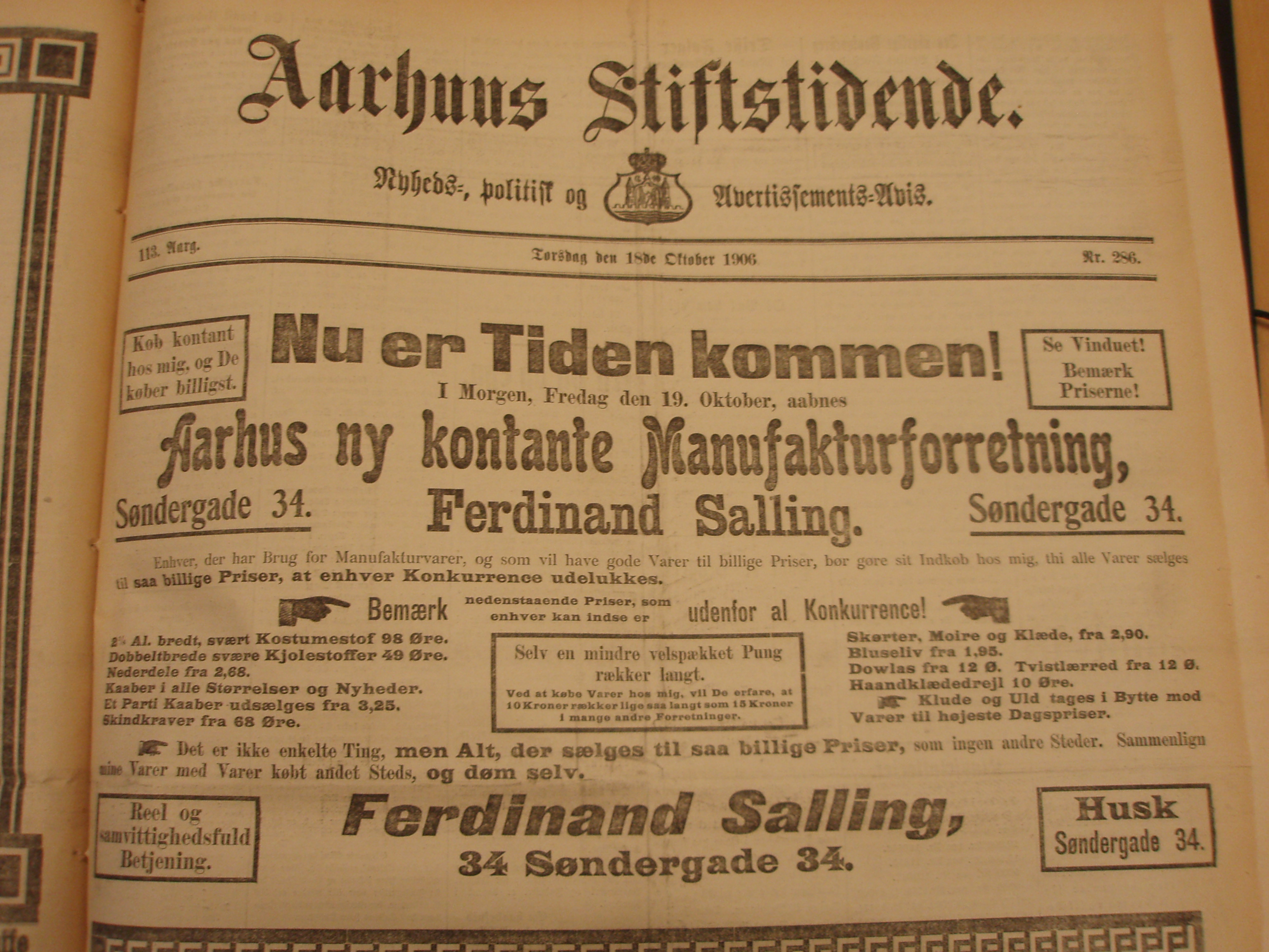 Reklame i Århus Stiftidende 18. oktober 1906 for åbningen af Ferdinand Sallings manufakturforretning.